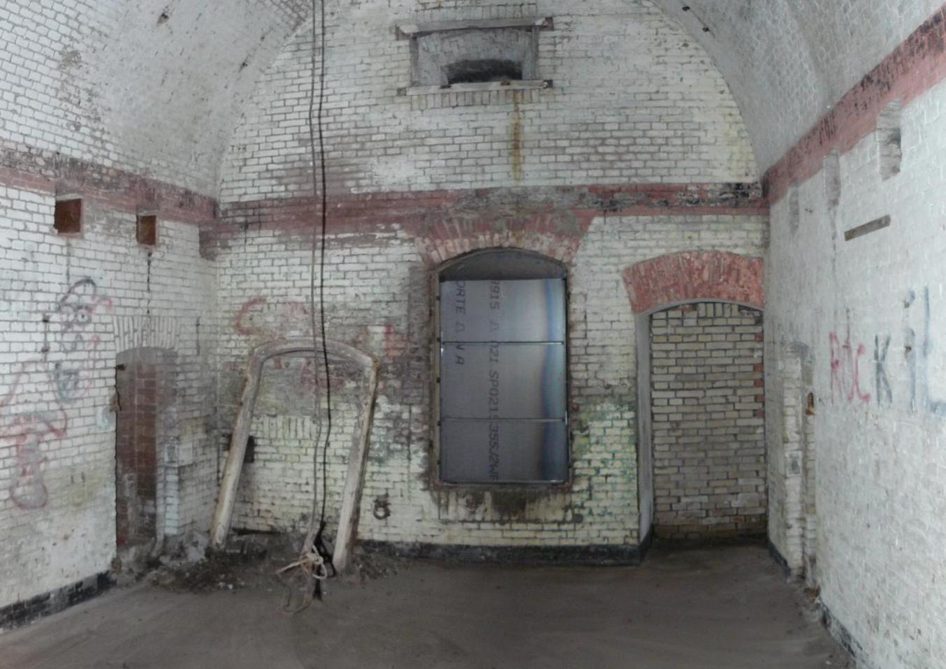 De centrale ruimte en deze foto is stroomopwaarts de Vecht genomen. Achter de fotograaf ligt de voormalige hoofdingang. Van hieruit kon men de Vecht en naastgelegen dijken en wegen onder vuur nemen. Rechts een dichtgemetselde deur die uitkwam op een korte gedekte weg. De houten tussenvloer is weg, maar de plaats waar de balken hebben gezet is duidelijk te zien. Boven is nog een schietgat zichtbaar. Dit was een ruimte voor de soldaten, De foto is een samenvoeging van twee foto's en daarom enigszins vervormd.